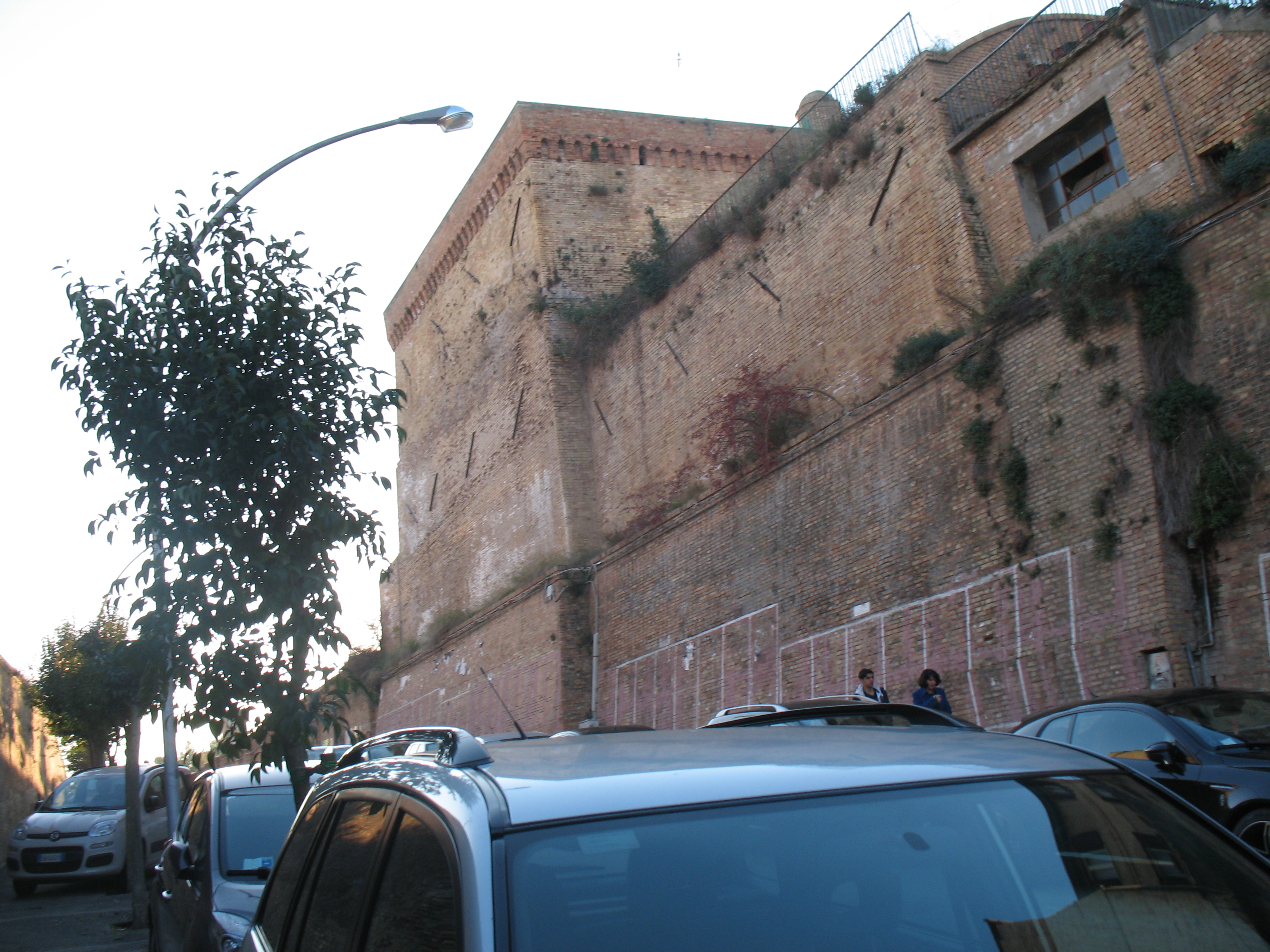 Antica Cisterna della Civitella, rione di Chieti.